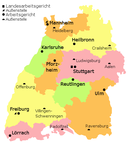 Gerichtsbezirke der Arbeitsgerichtsbarkeit in Baden-Württemberg